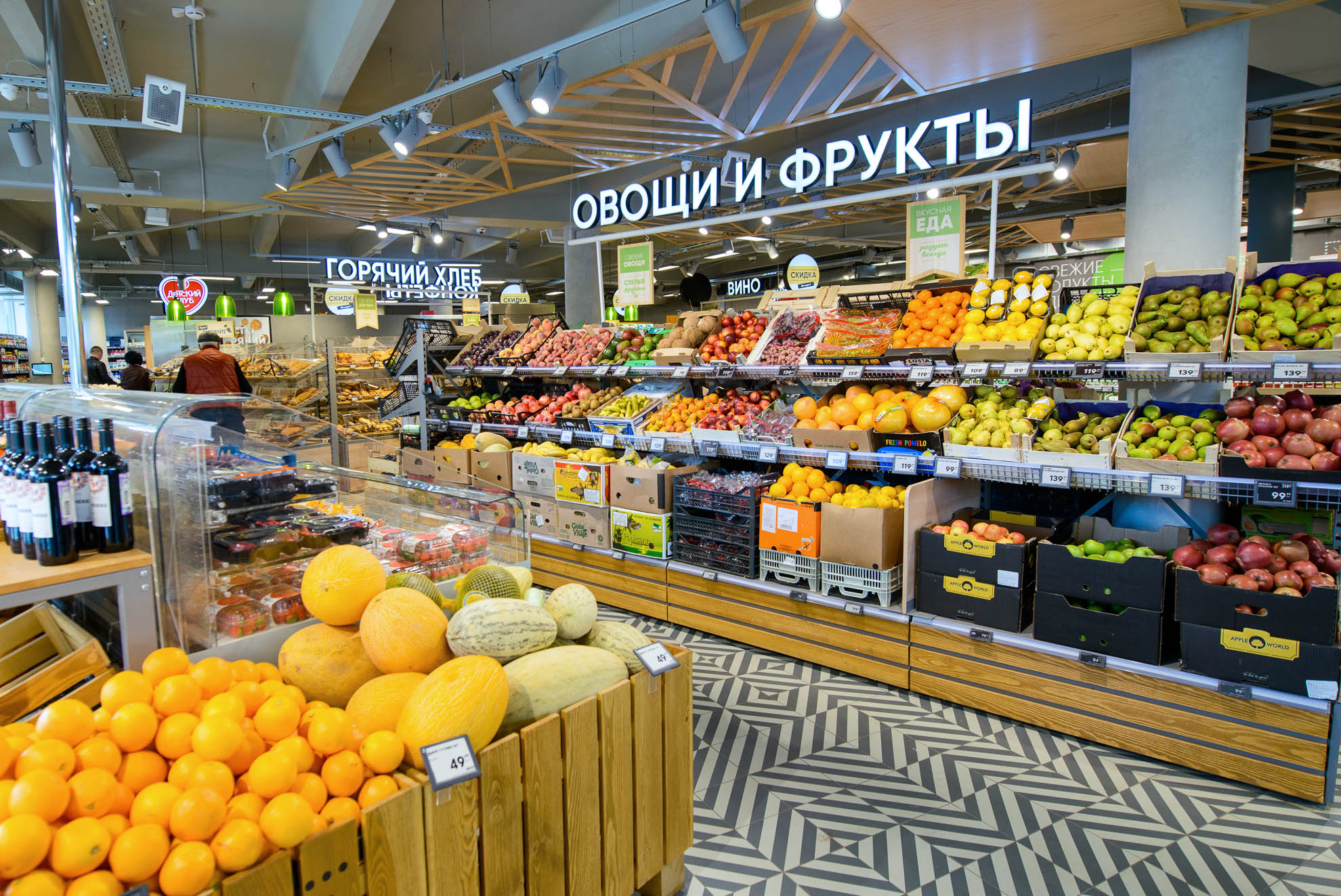 С декабря 2019 года все универсамы «Пятёрочка» открываются в новой концепции и с обновлённым дизайном. Появились пекарня, кофе-автомат, аппарат со свежевыжатыми соками, кассы самообслуживания разработки X5 Retail Group, зона для перекуса и зарядки гаджетов, покупательские корзины из переработанного пластика, многоразовые сумки из спанбонда и тканевые, бумажные пакеты и мешочки для фруктов и овощей, электронные ценники.